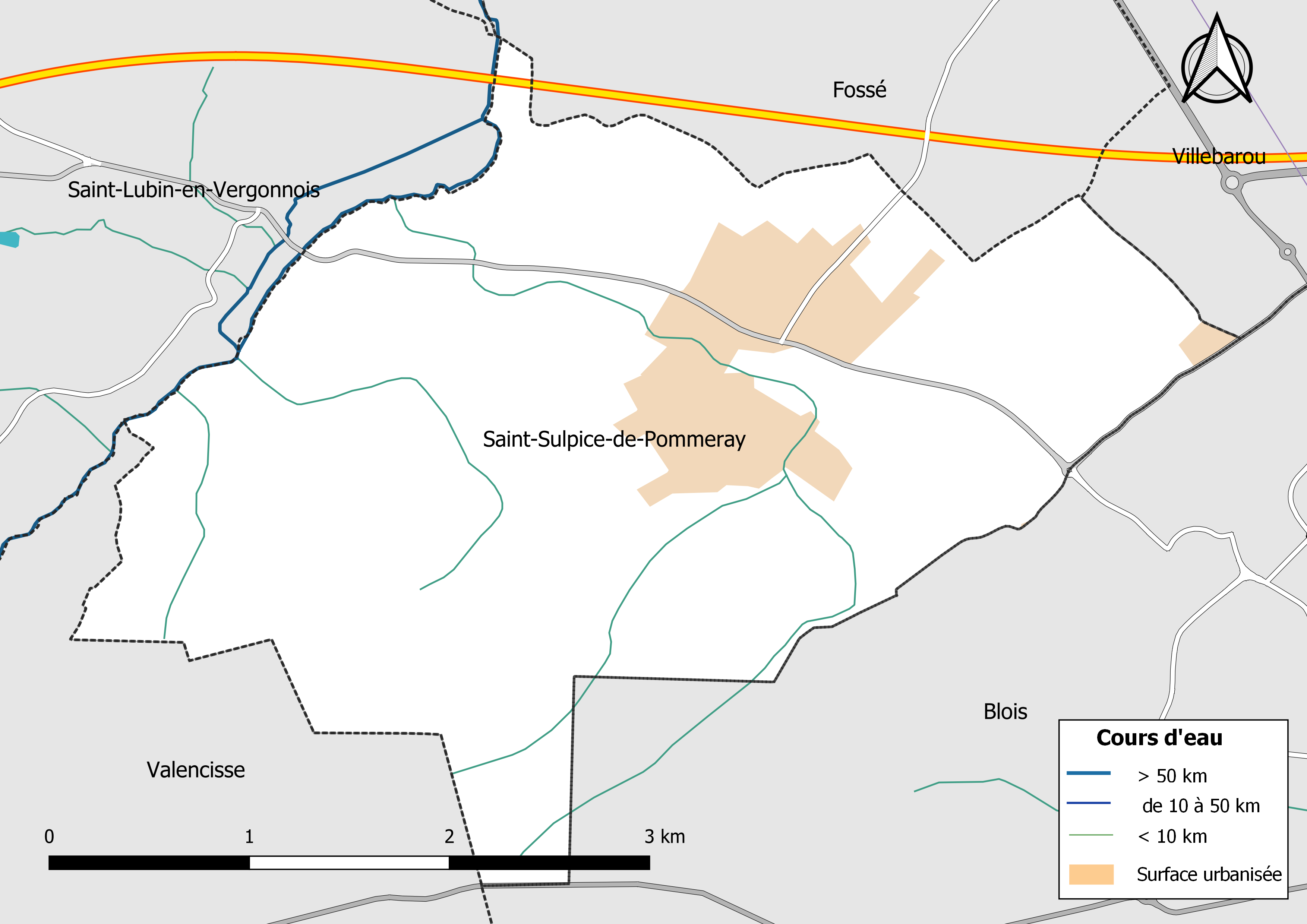 Carte du réseau hydrographique de la commune de Saint-Sulpice-de-Pommeray (Loir-et-Cher, France).